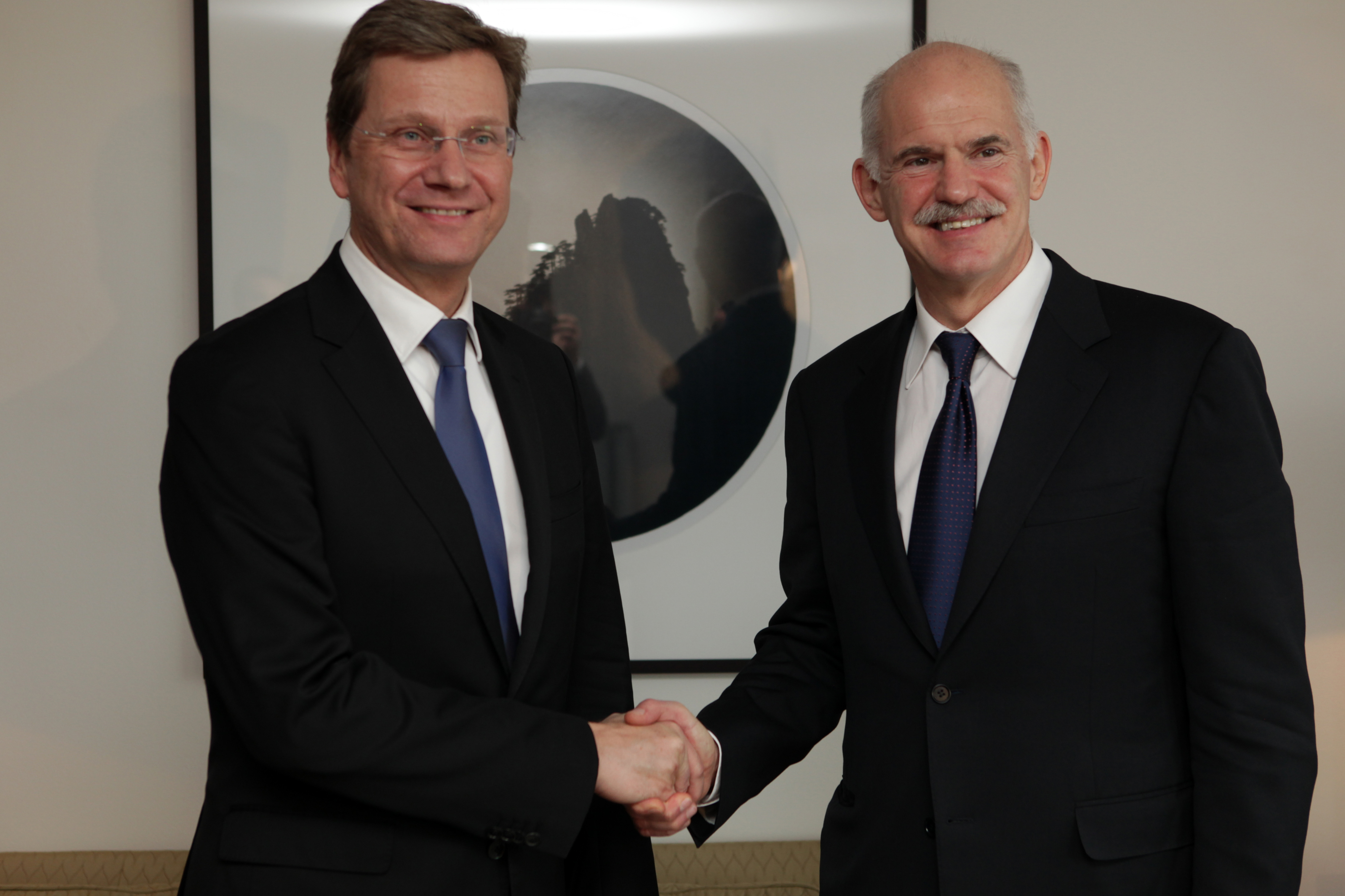 Guido Westerwelle, Giorgos Andrea Papandreou (Γεώργιος Α. Παπανδρέου) 22. Februar 2011